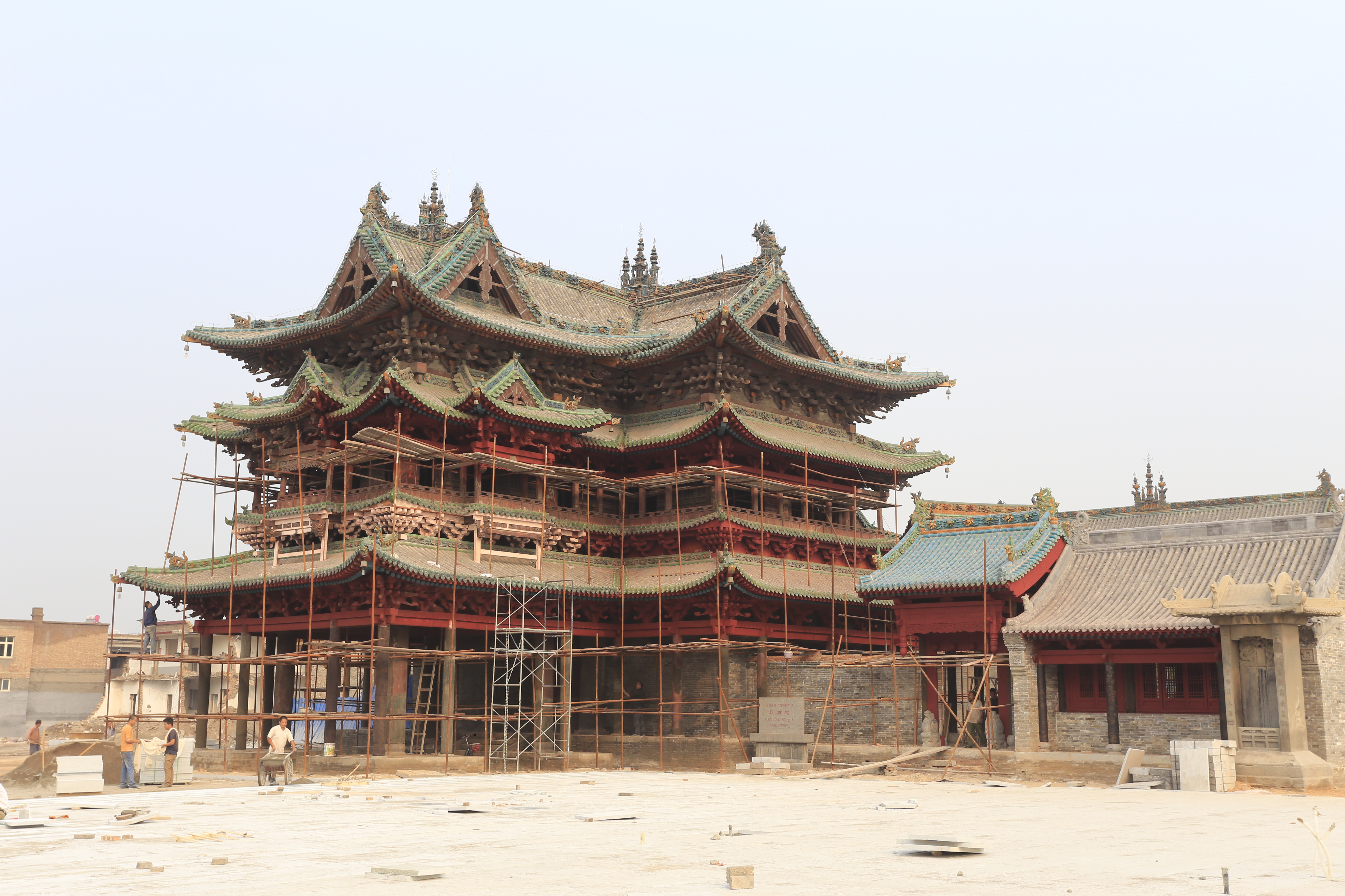 介休祆神楼